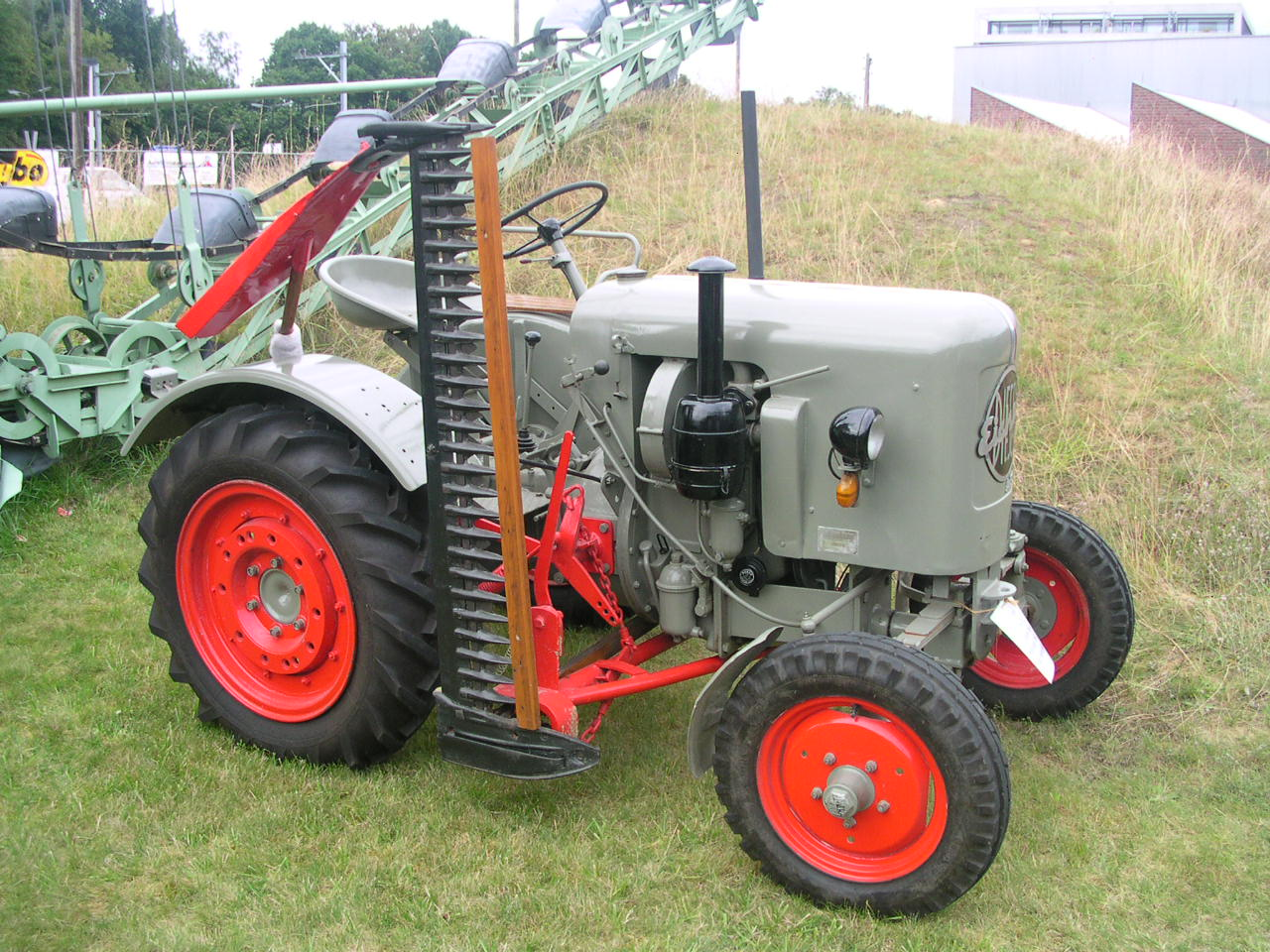 Kerkrade, Maschinenfest im Industrion, Eicher-Traktor mit Mähbalken